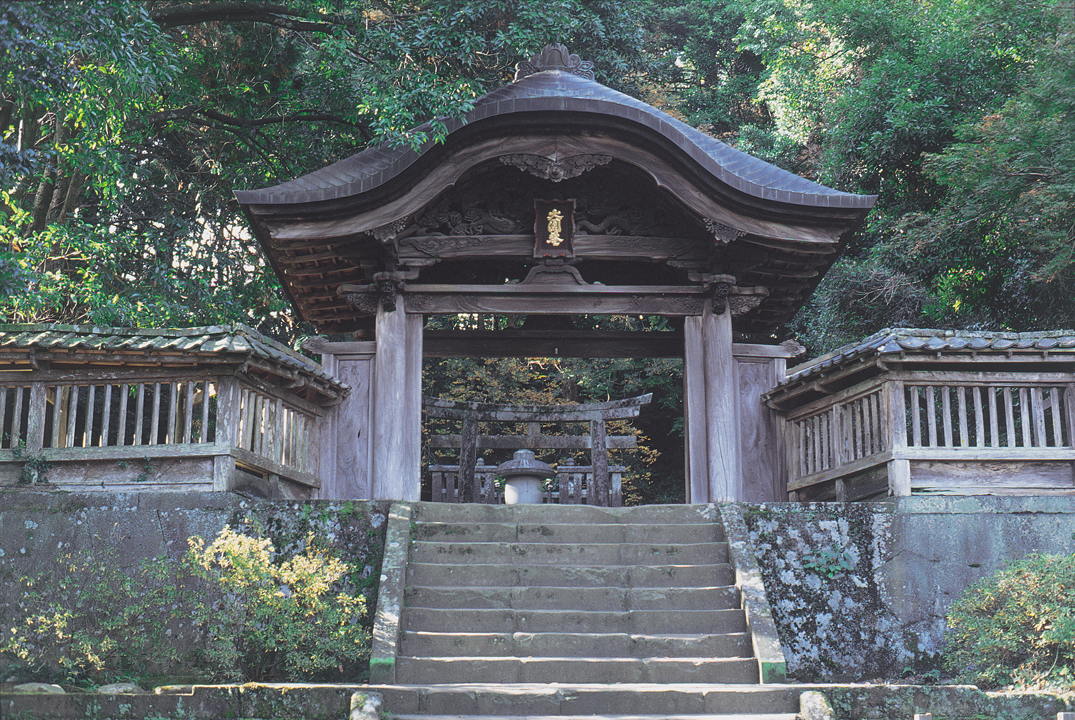 Gesshouji Temple in Matsue City - 松江市の月照寺